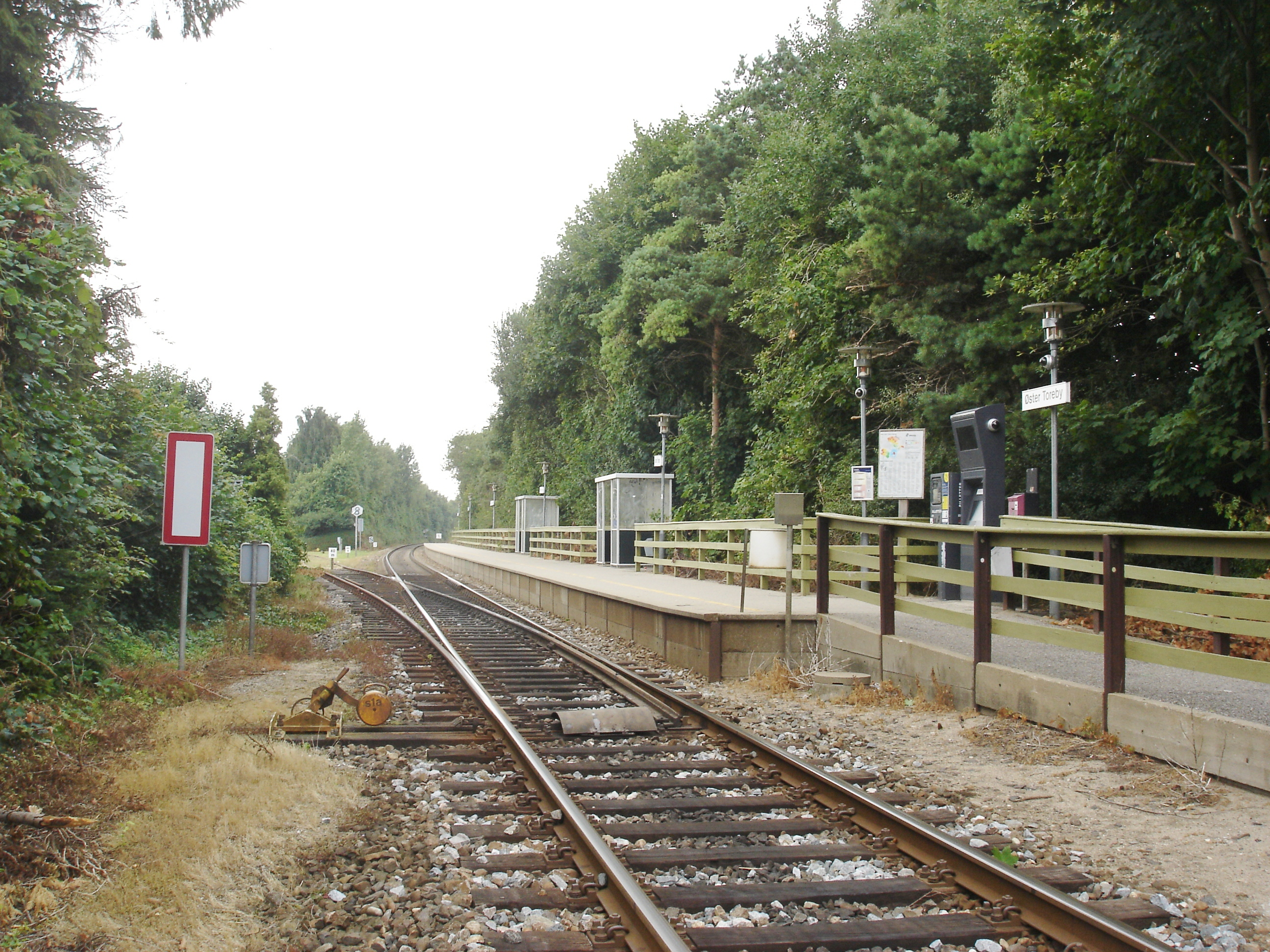 Nystedbanens afgrening fra Lollandsbanen på Øster Toreby station